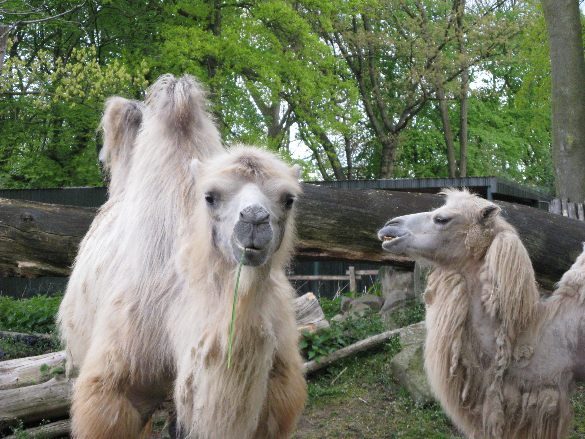 Trampeltiere